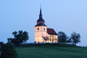 Kaubenheimer Bergkirche St. Michael